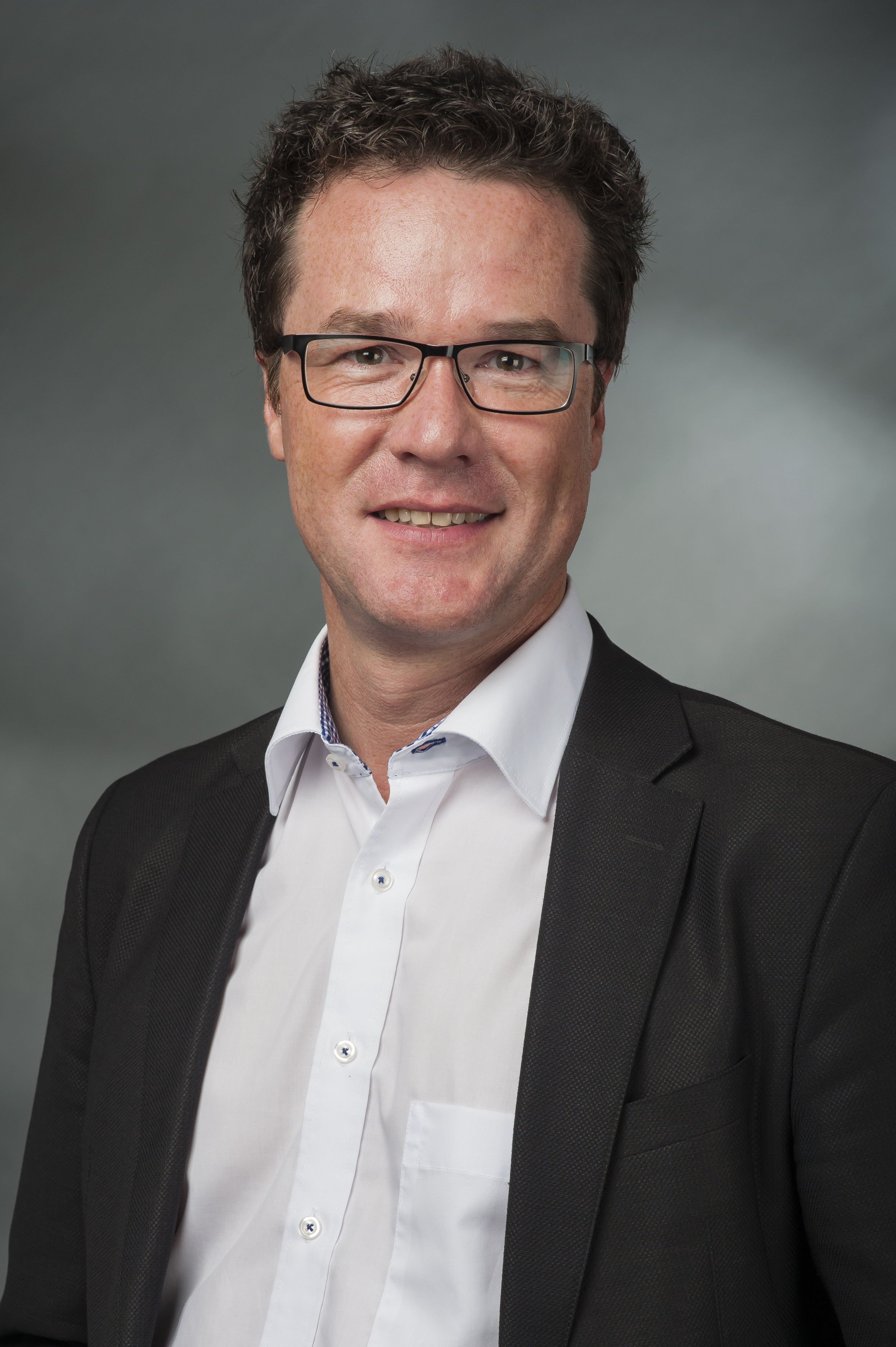 Harald Ebner (* 8. Juli 1964 in Göppingen) ist ein deutscher Politiker (Bündnis 90/Die Grünen). Er ist seit dem 25. Mai 2011 als Nachrücker Mitglied des Deutschen Bundestages.